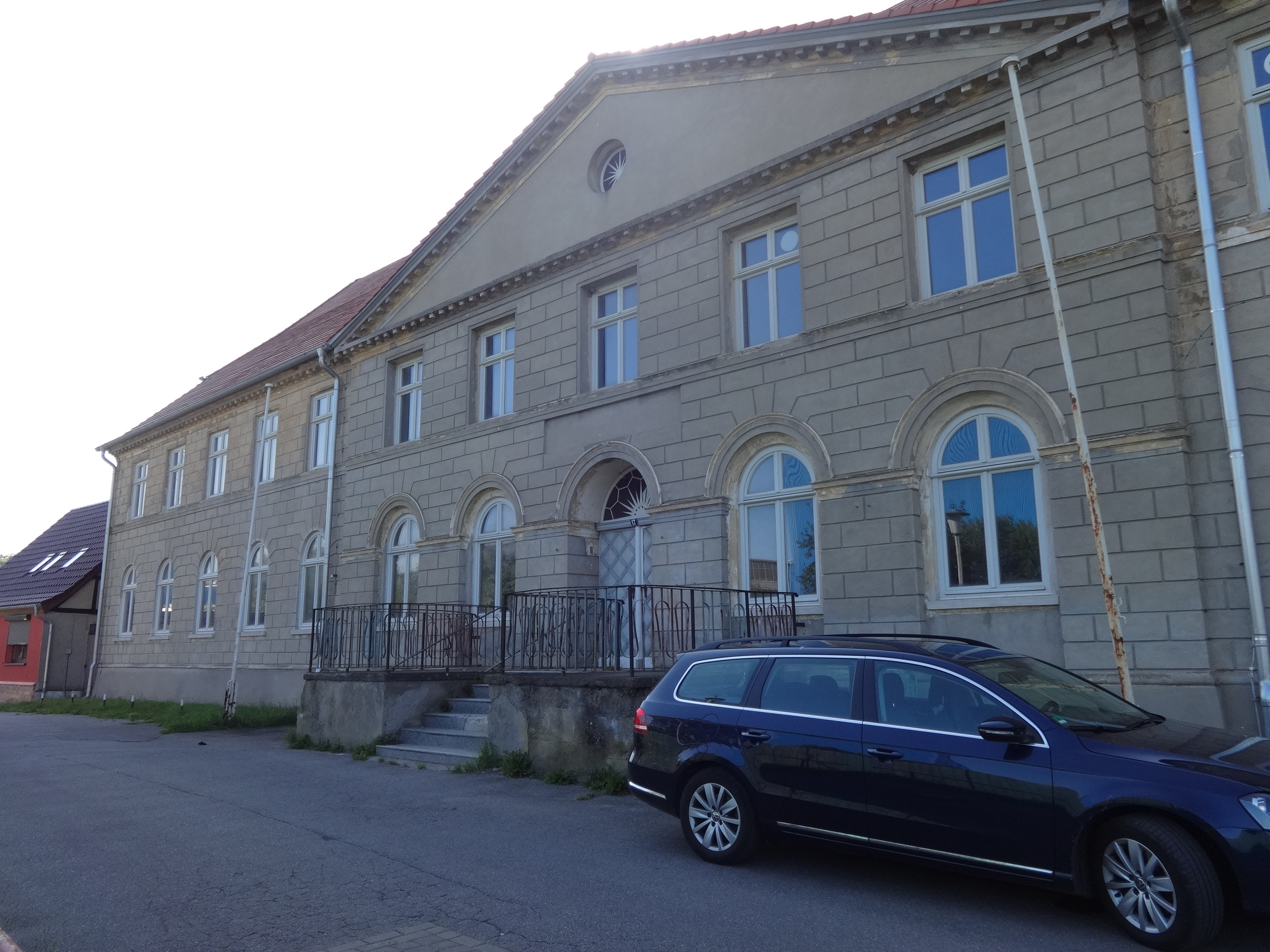 Denkmalgeschütztes Haus in der Kronwiekstraße 17 in Wolgast